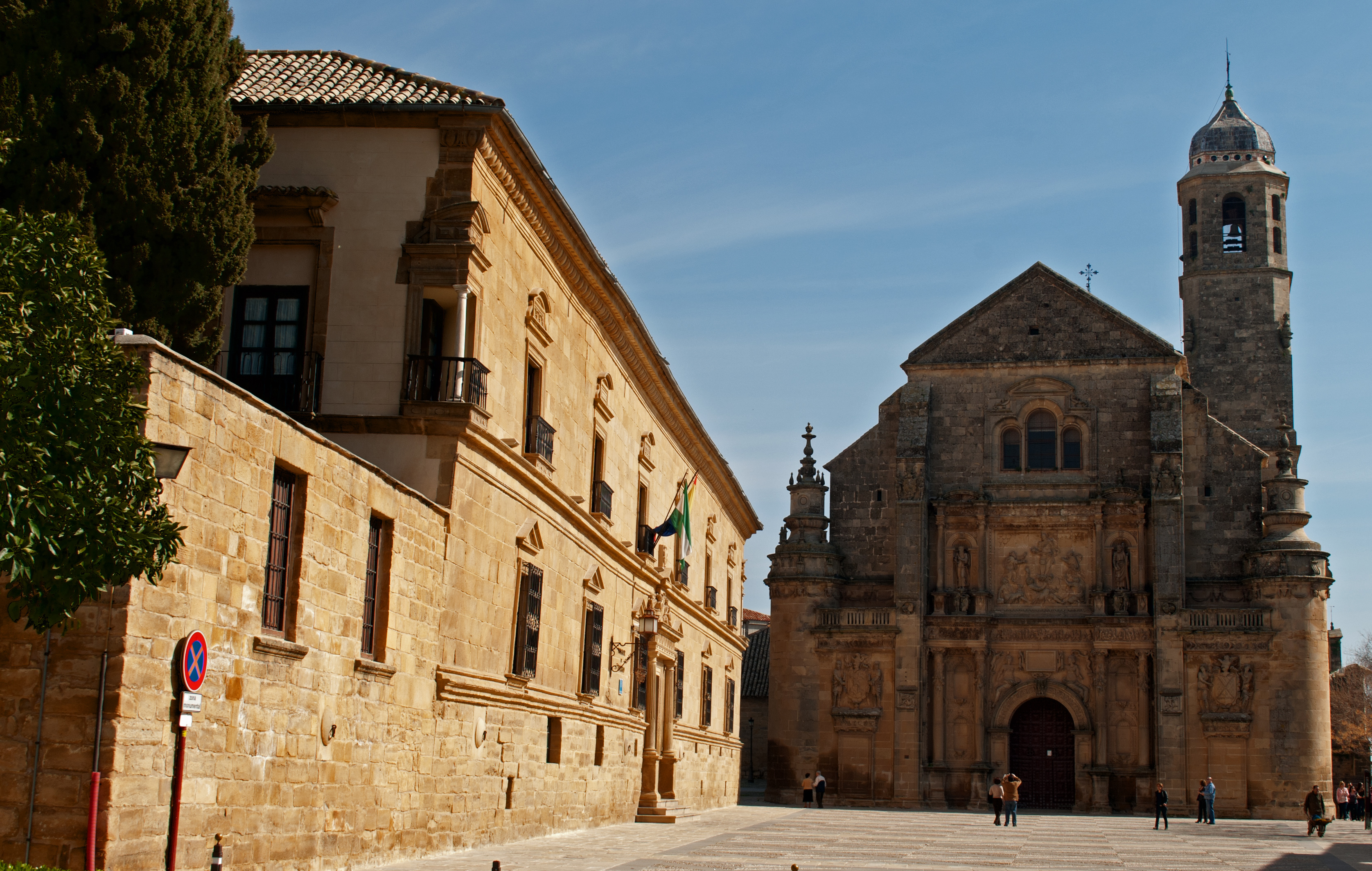 Iglesia del Salvador, Úbeda.